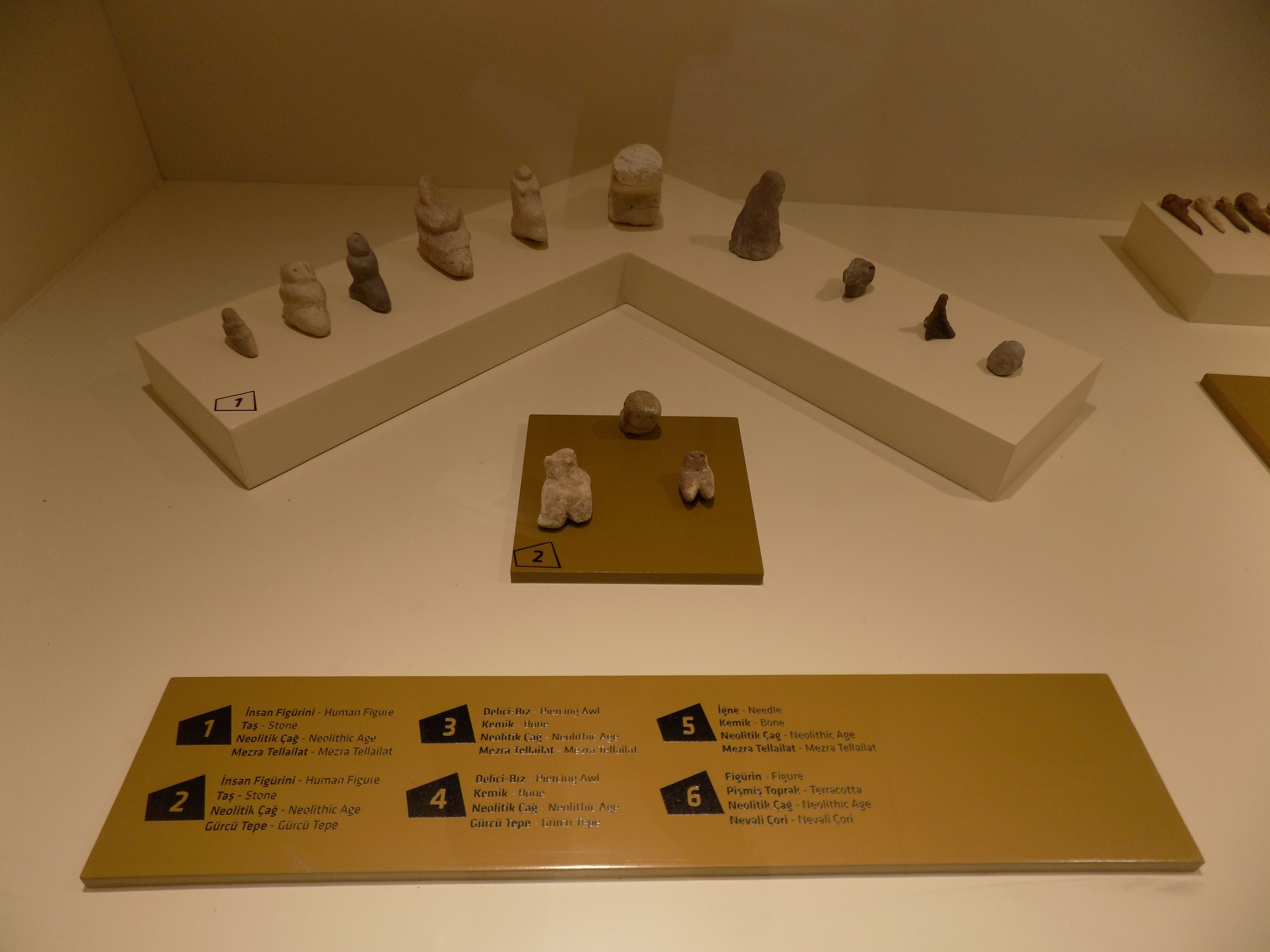 Şanlıurfa Müzesinin Neolitik Çağ salonunda sergilenen buluntular.